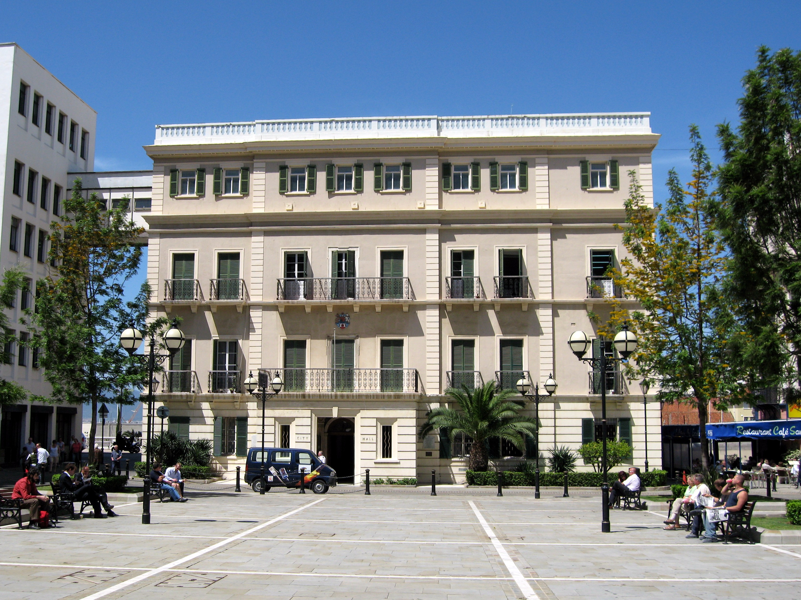 Rathaus (City Hall) von Gibraltar am John-Mackintosh-Platz (John Mackintosh Square)